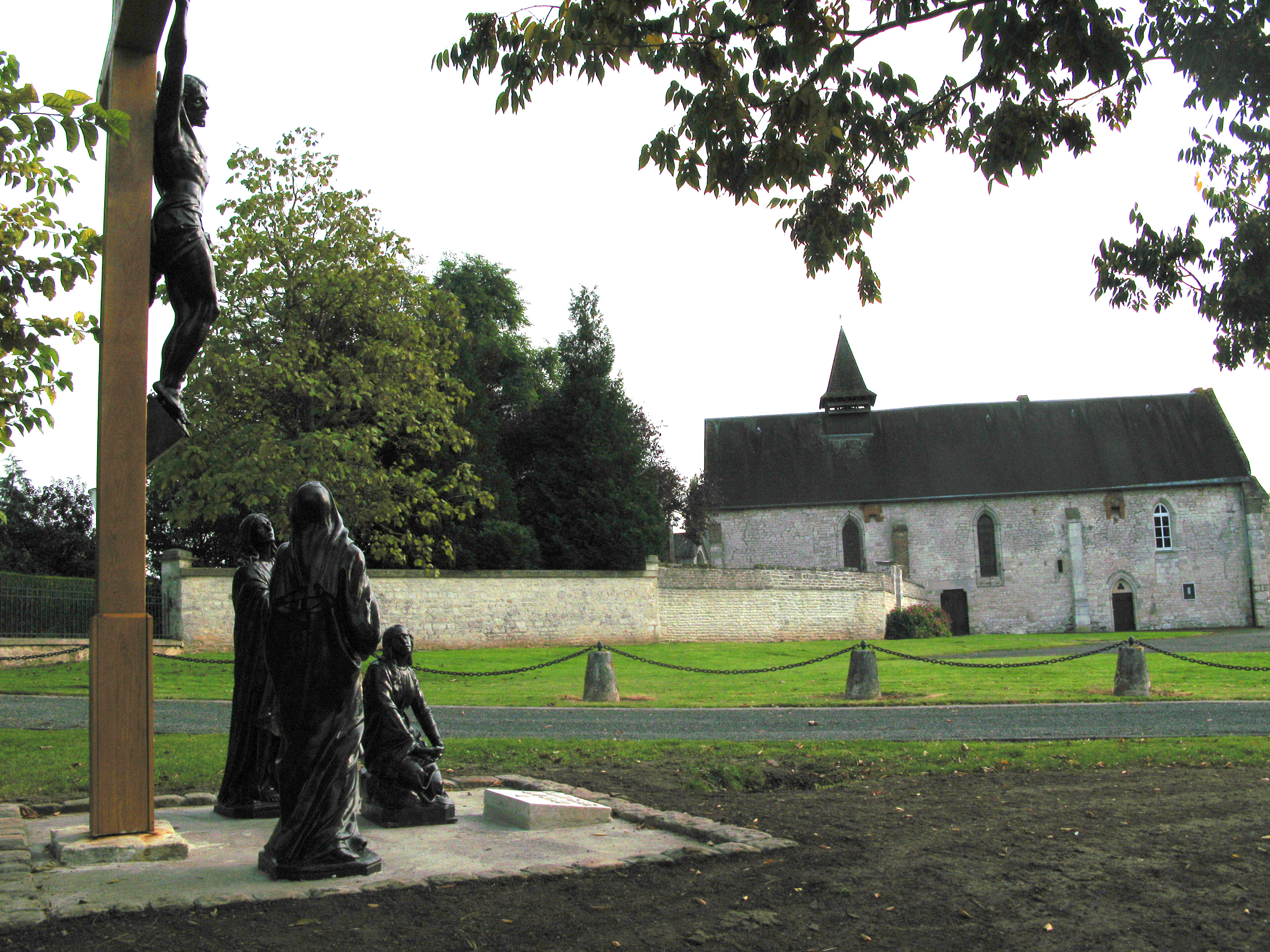 Clermont-les-Fermes (Aisne, France) - L'église fortifiée (façade nord). Sur cette vue, l'église est légèrement déformée par la perspective. Au cadrage, il fallait choisir entre crucifix vertical ou église non déformée. Un traitement numérique devrait corriger cette photo originale.